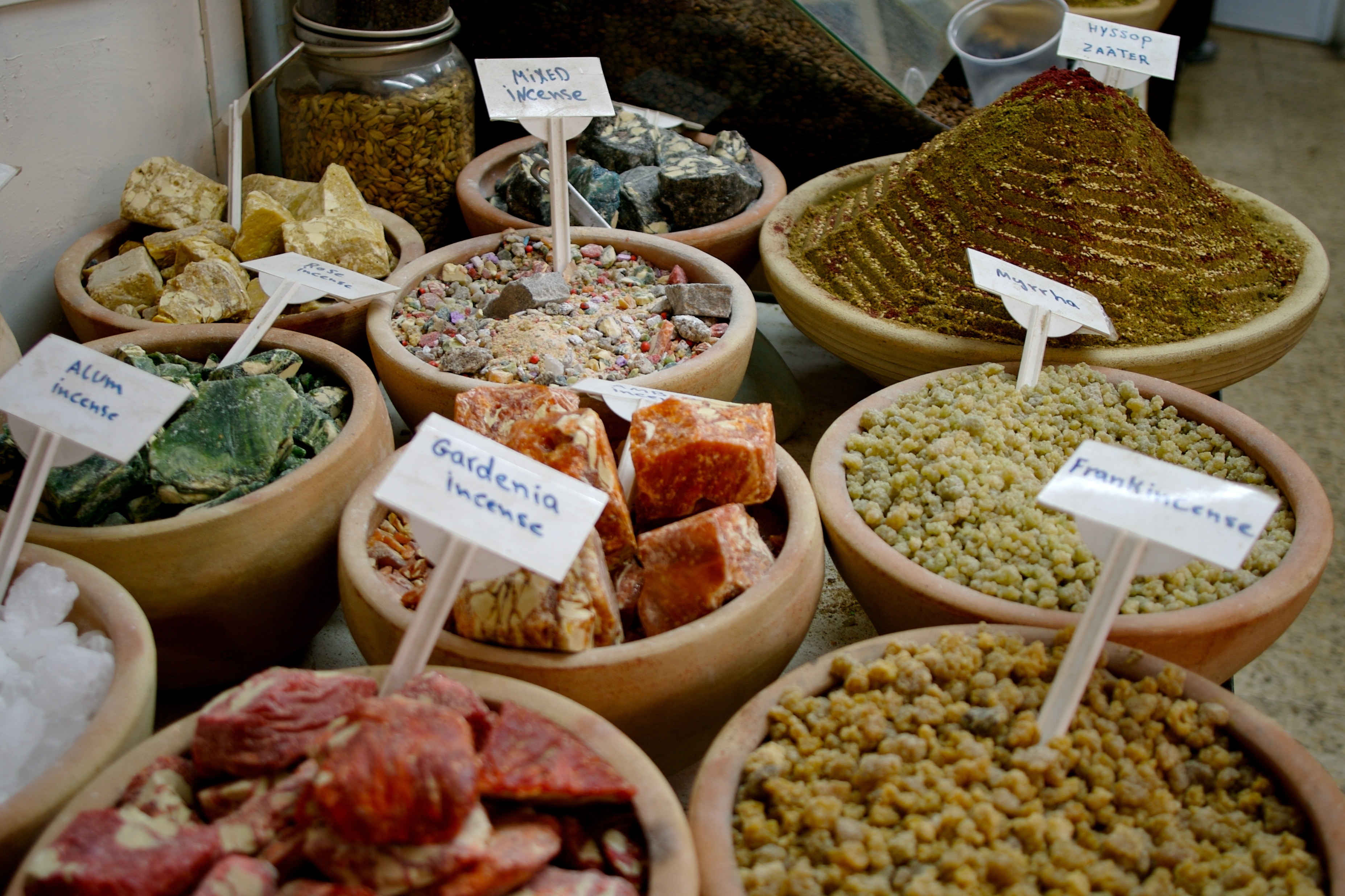 Incense